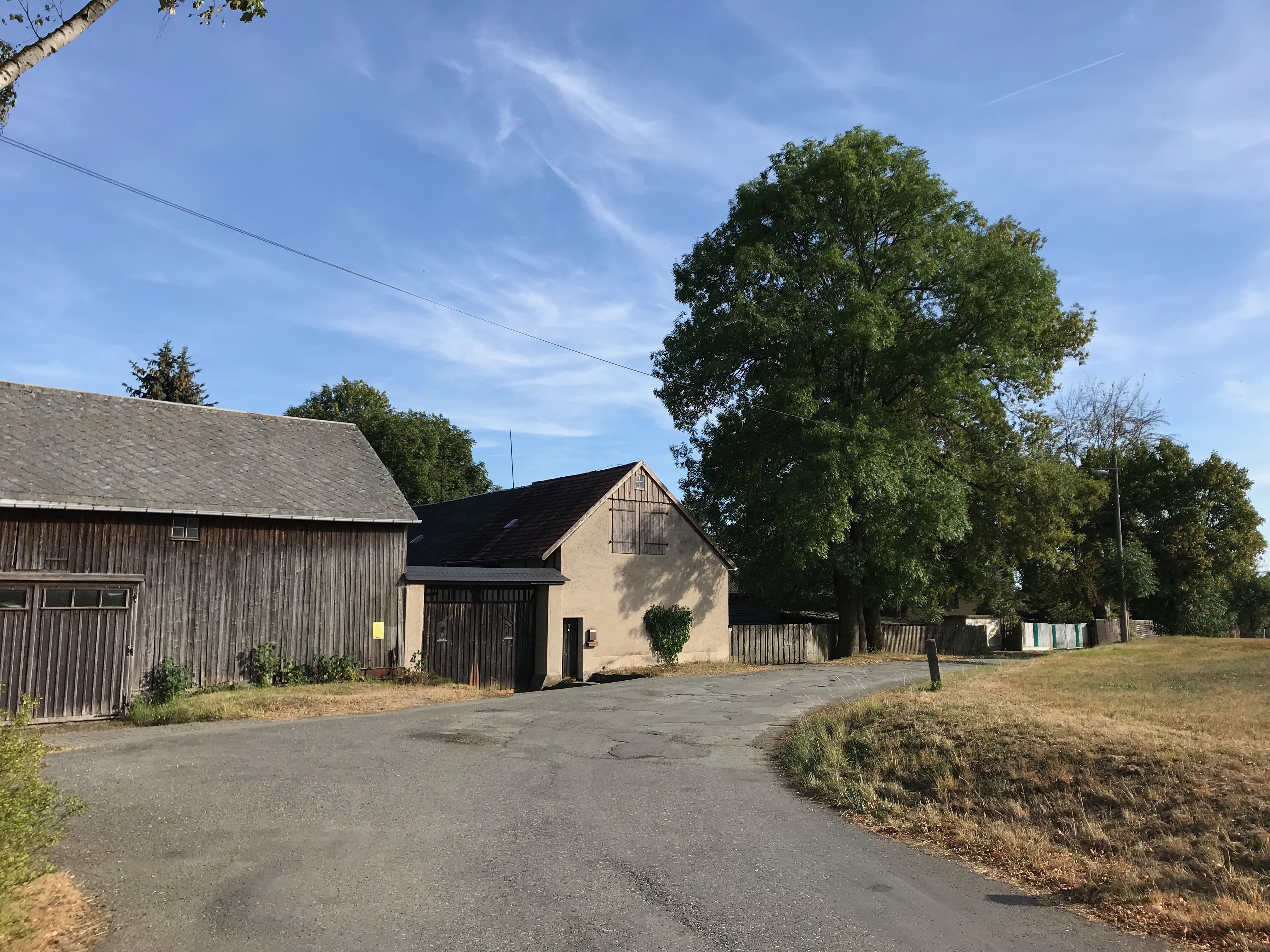 Bauerngut Neudörfel